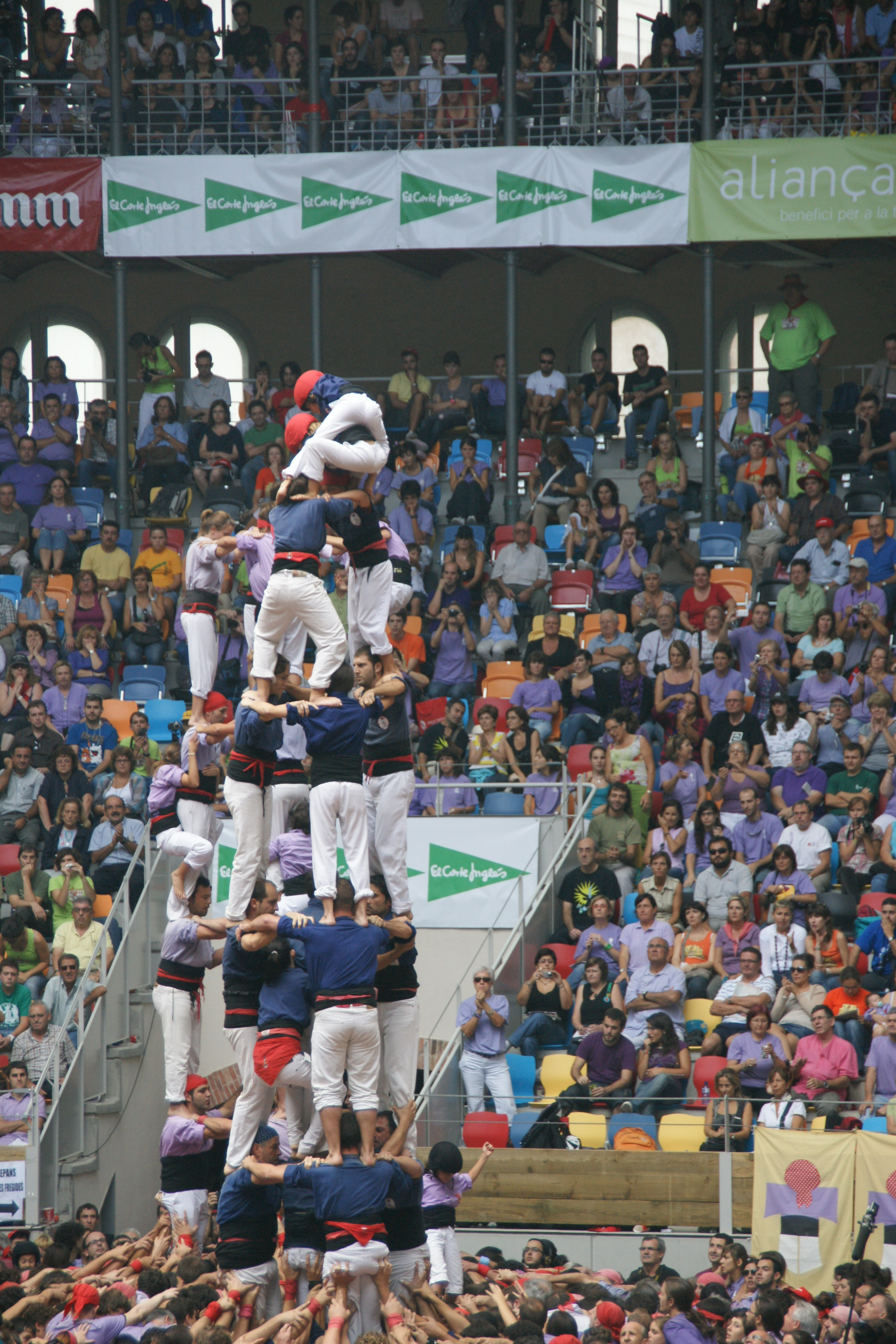 Xiquets del Serrallo, 3 de 7 amb agulla descarregat. Concurs 2010